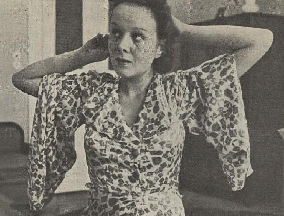 Eva Gerová (1920-2013), česká herečka a zpěvačka